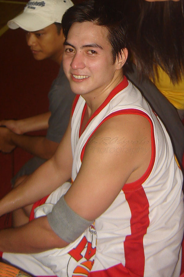 Filipino actor, Wendell Ramos